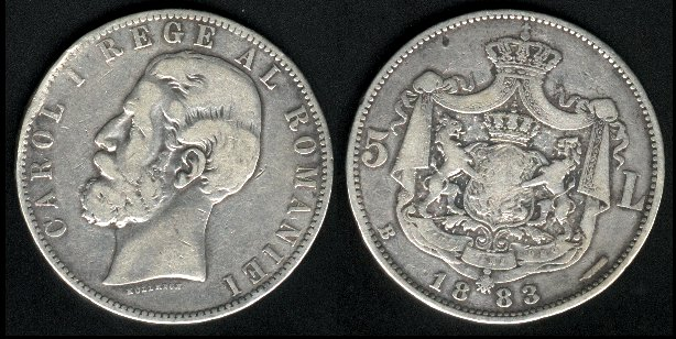 Romanian 5 Lei coin